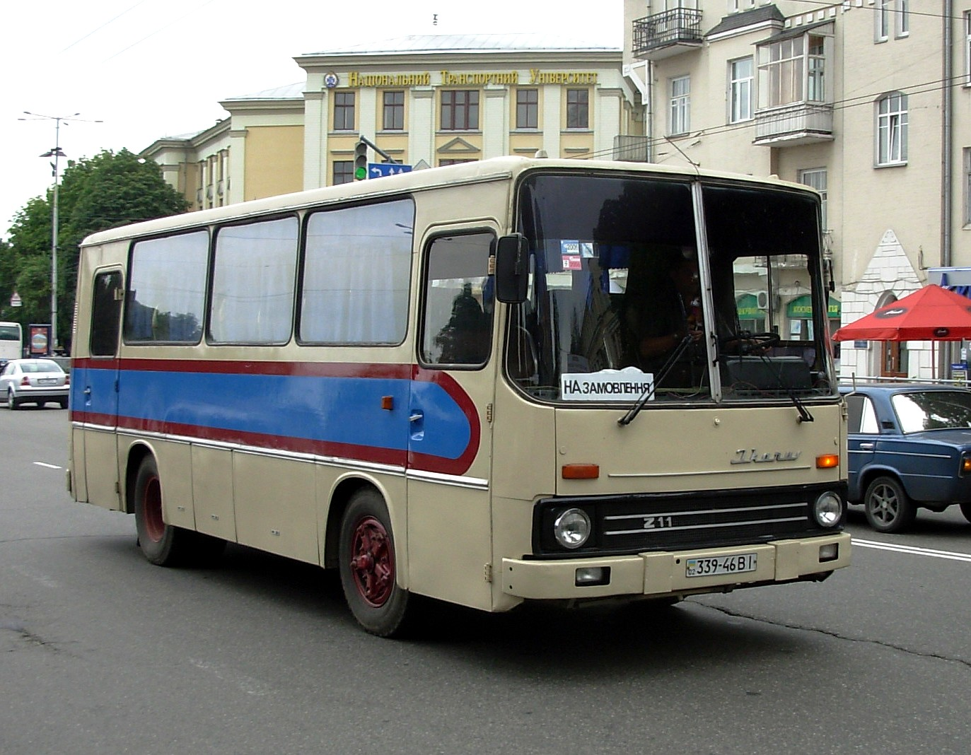 Ikarus bus 211 in Kyiv, Ukraine